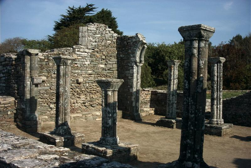 Chapelle de Languidou : nef